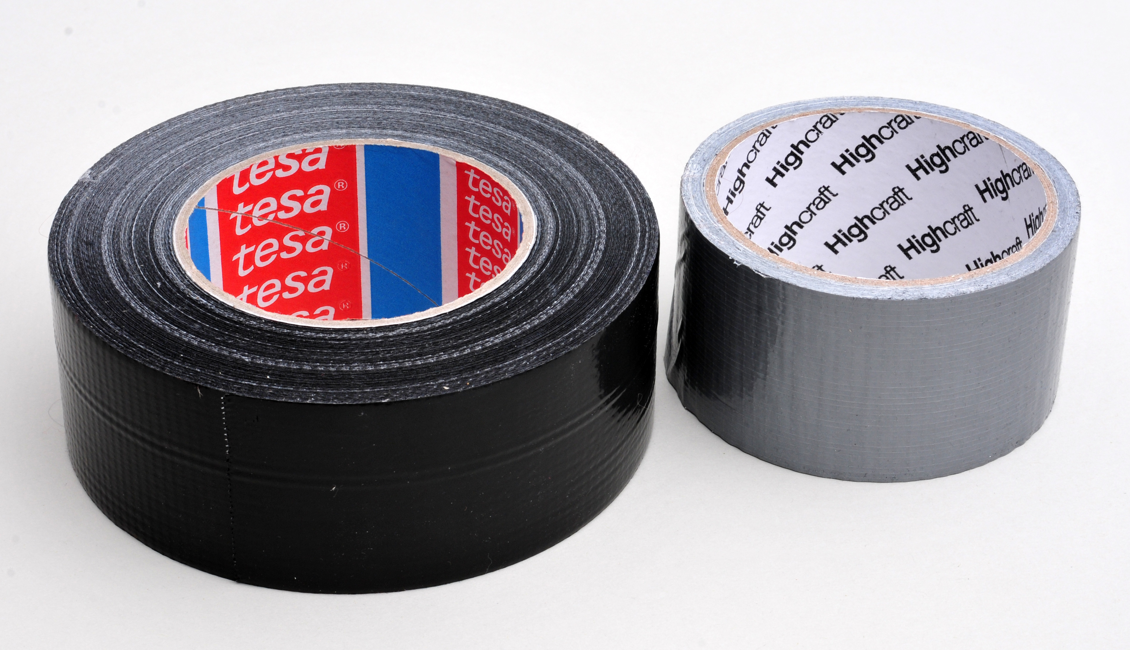 Inventur der Blitzanlage Wikimedia Deutschland)